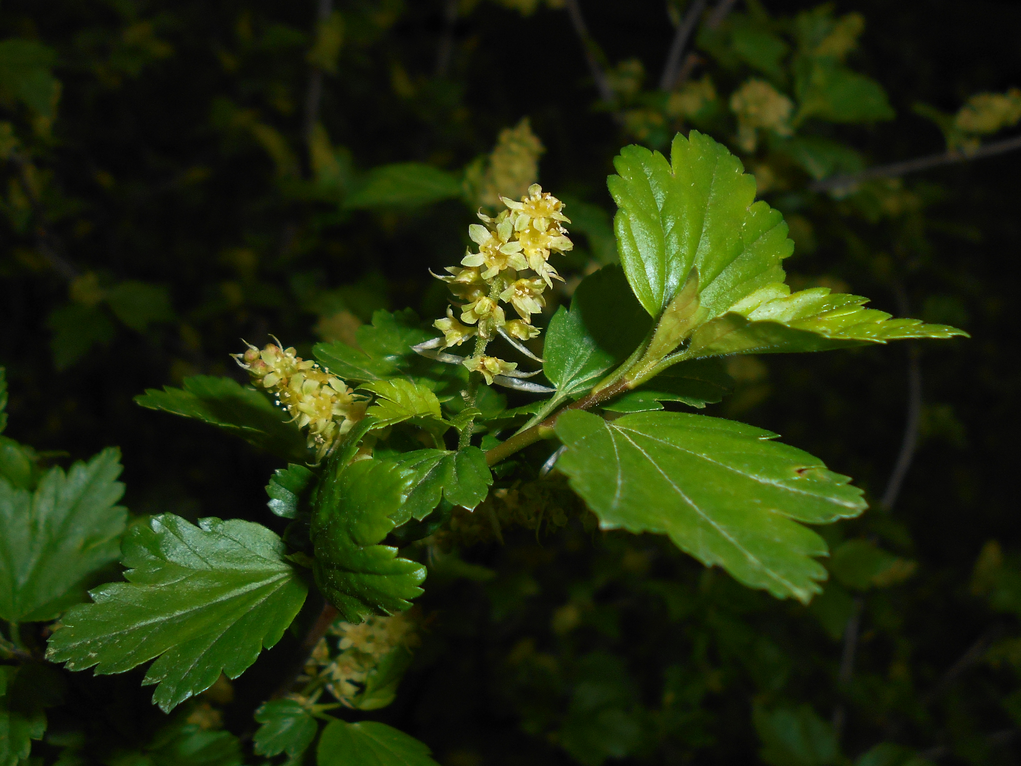 Porzeczka alpejska (Ribes alpinum), Ogród Botaniczny UMCS w Lublinie